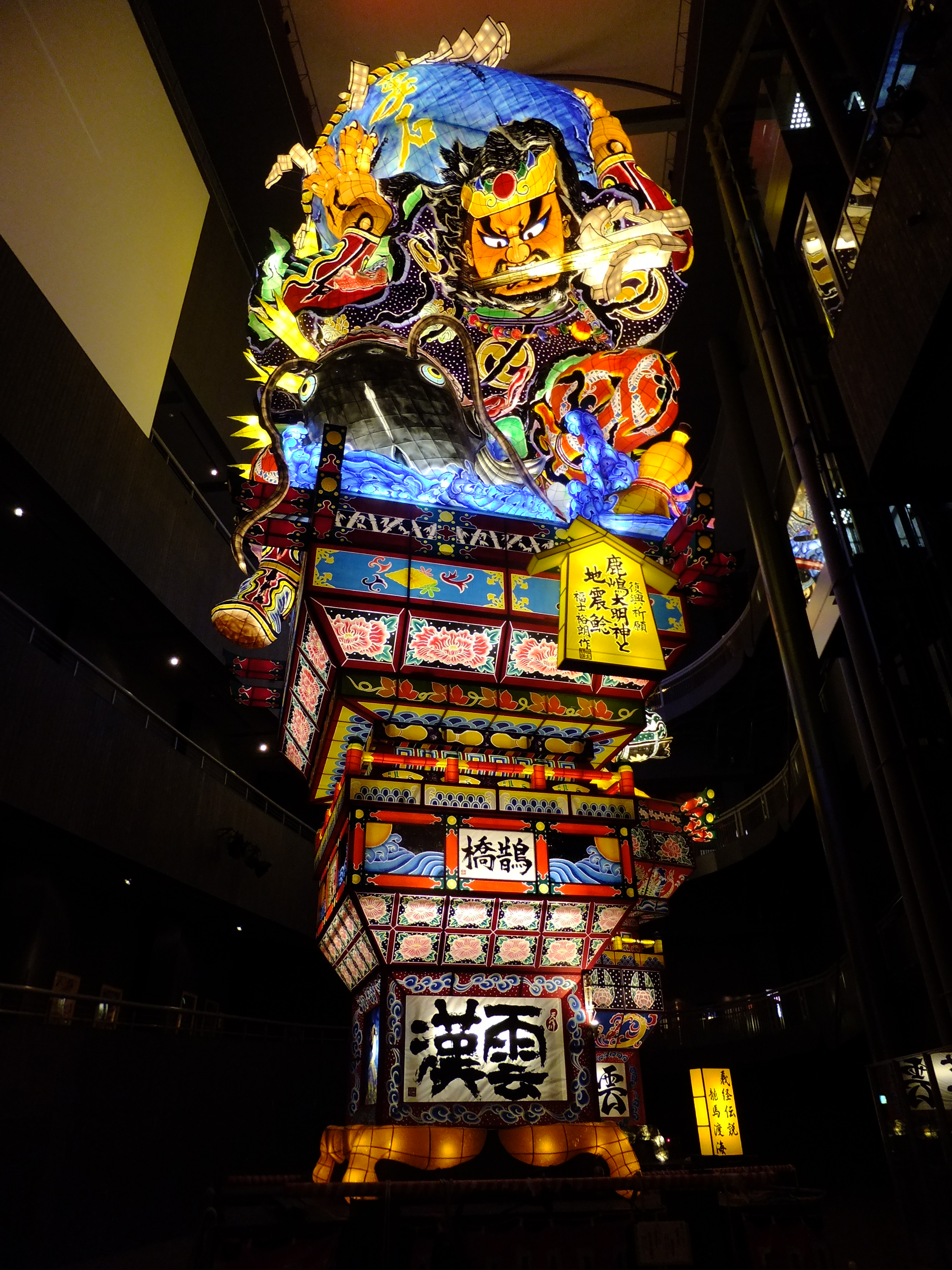 五所川原立佞武多、2012年作品『復興祈願・鹿嶋大明神と地震鯰』（青森県五所川原市、立佞武多の館にて）